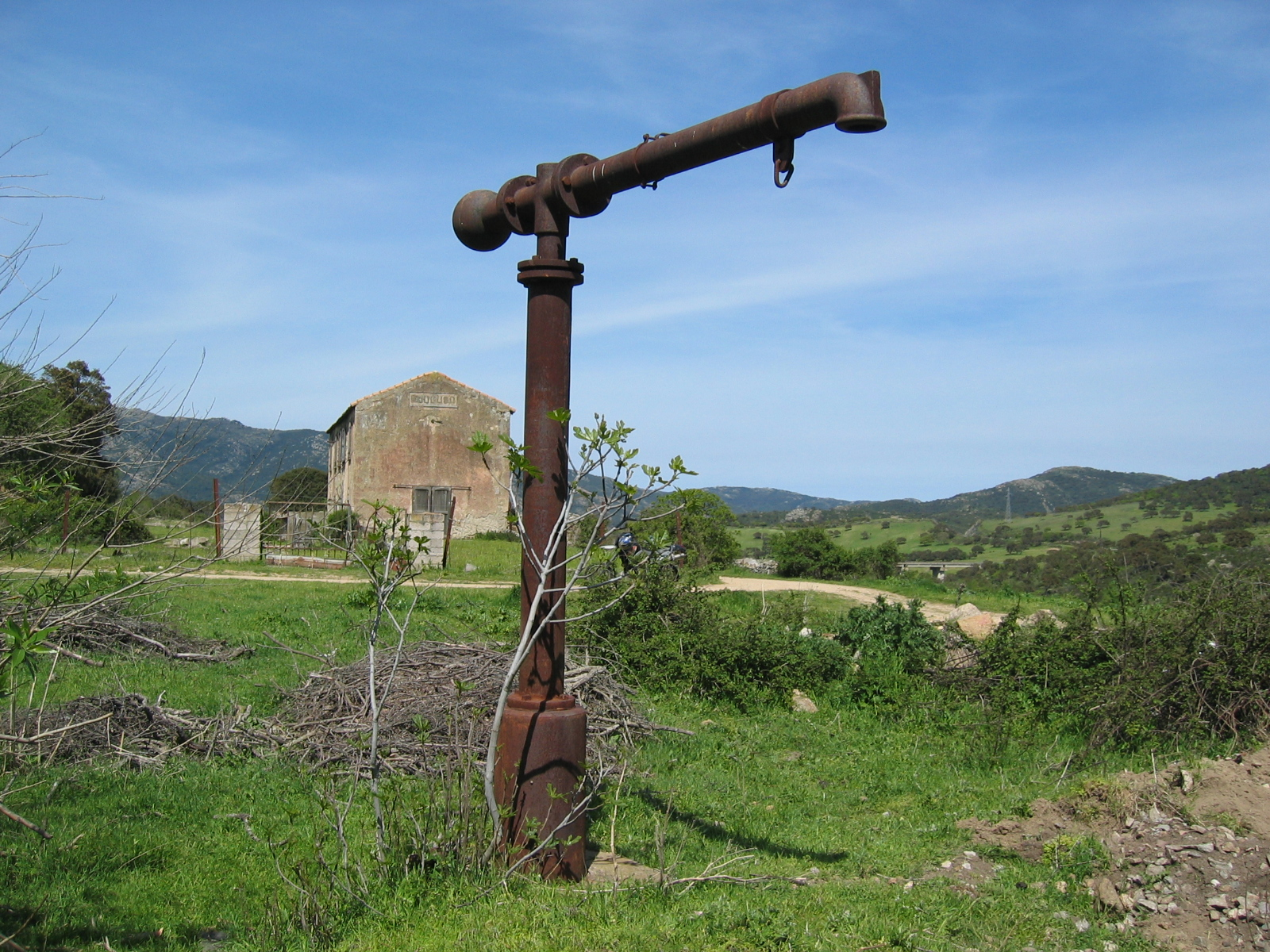 Foto scattata il 25.4.2008